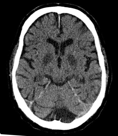 This image is part of a series which can be scrolled interactively with the mousewheel or mouse dragging. This is done by using Template:Imagestack. The series is found in the category Profound hypoxia case 001. Computertomographie des Schädels bei einem Patienten nach generalisierter Hypoxie: Besonders die stoffwechselintensiven und somit hypoxieempfindlichen Regionen wie Globus pallidum, Hippocampus und auch die Hirnschenkel sind betroffen. Auch die Mark-Rinden-Differenzierung ist deutlich vermindert.